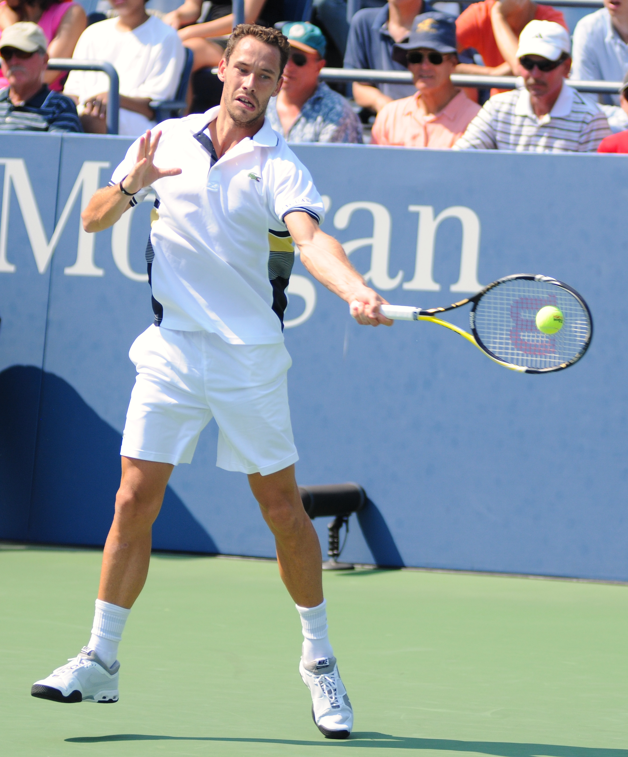 Michael Llodra - US Open 2010